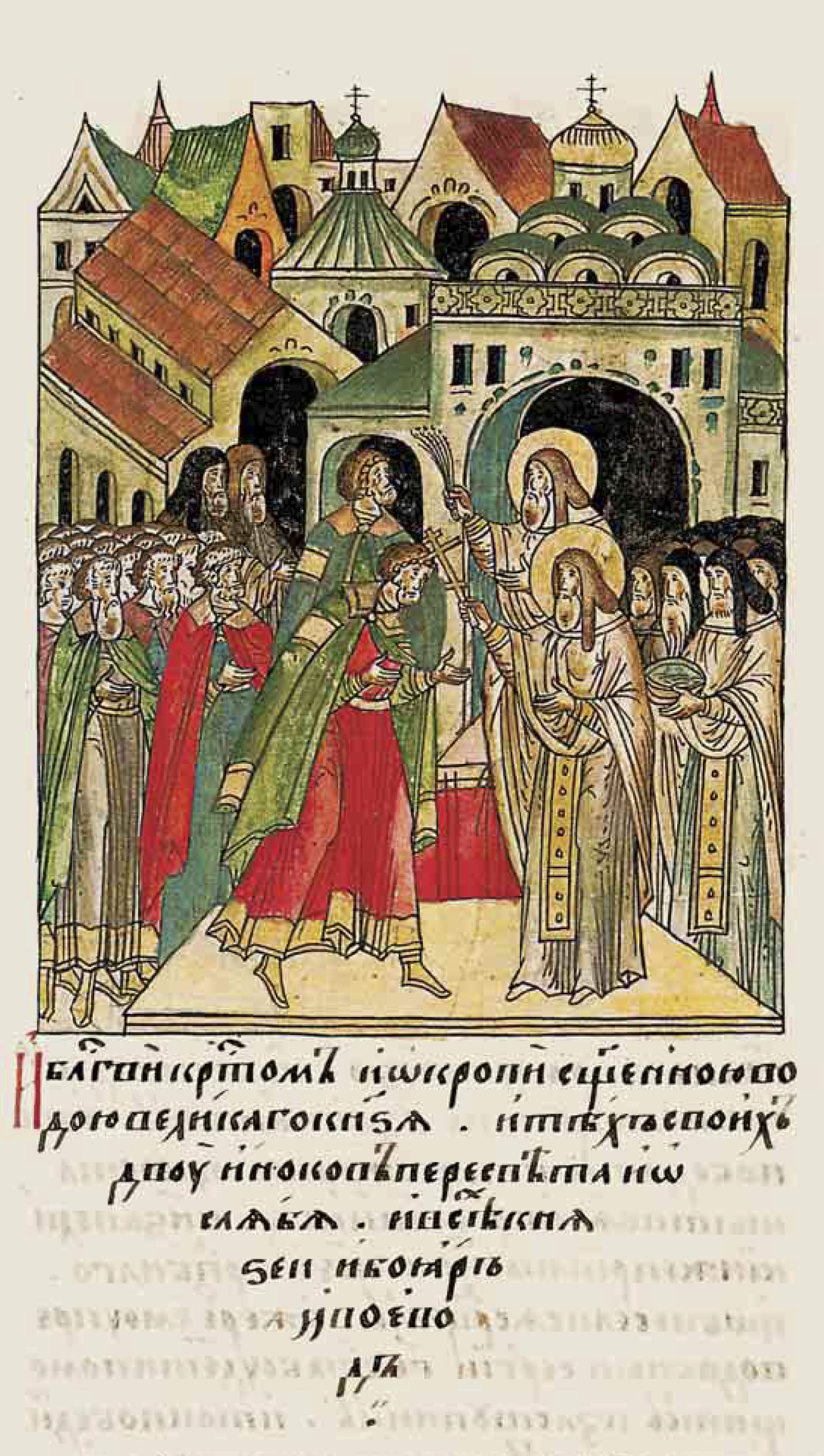 И благословил крестом, и окропил освященною водою великого князя и тех своих двух иноков, Пересвета и Ослябя, и всех князей, и бояр, и воевод.